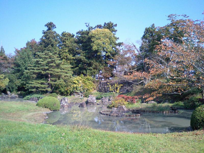 福島県伊達市梁川町字鶴ヶ岡にある梁川城趾。中世庭園「心字の池」。伊達市立梁川小学校の校庭の一角にある。Yanagawa Castle, Date, Fukushima, Japan 2006年11月3日、投稿者自身が撮影。